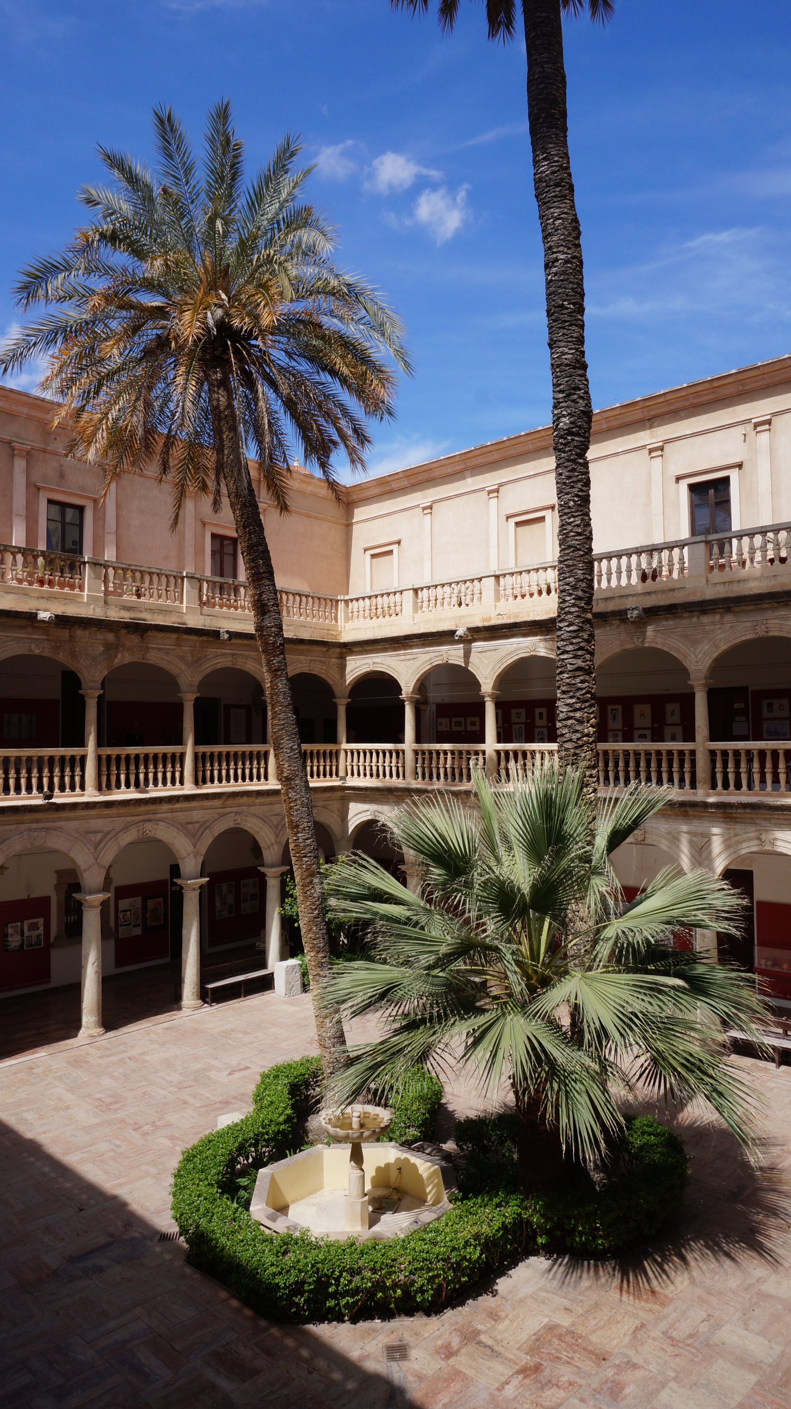 Patio de la Escuela de Arte de Almería